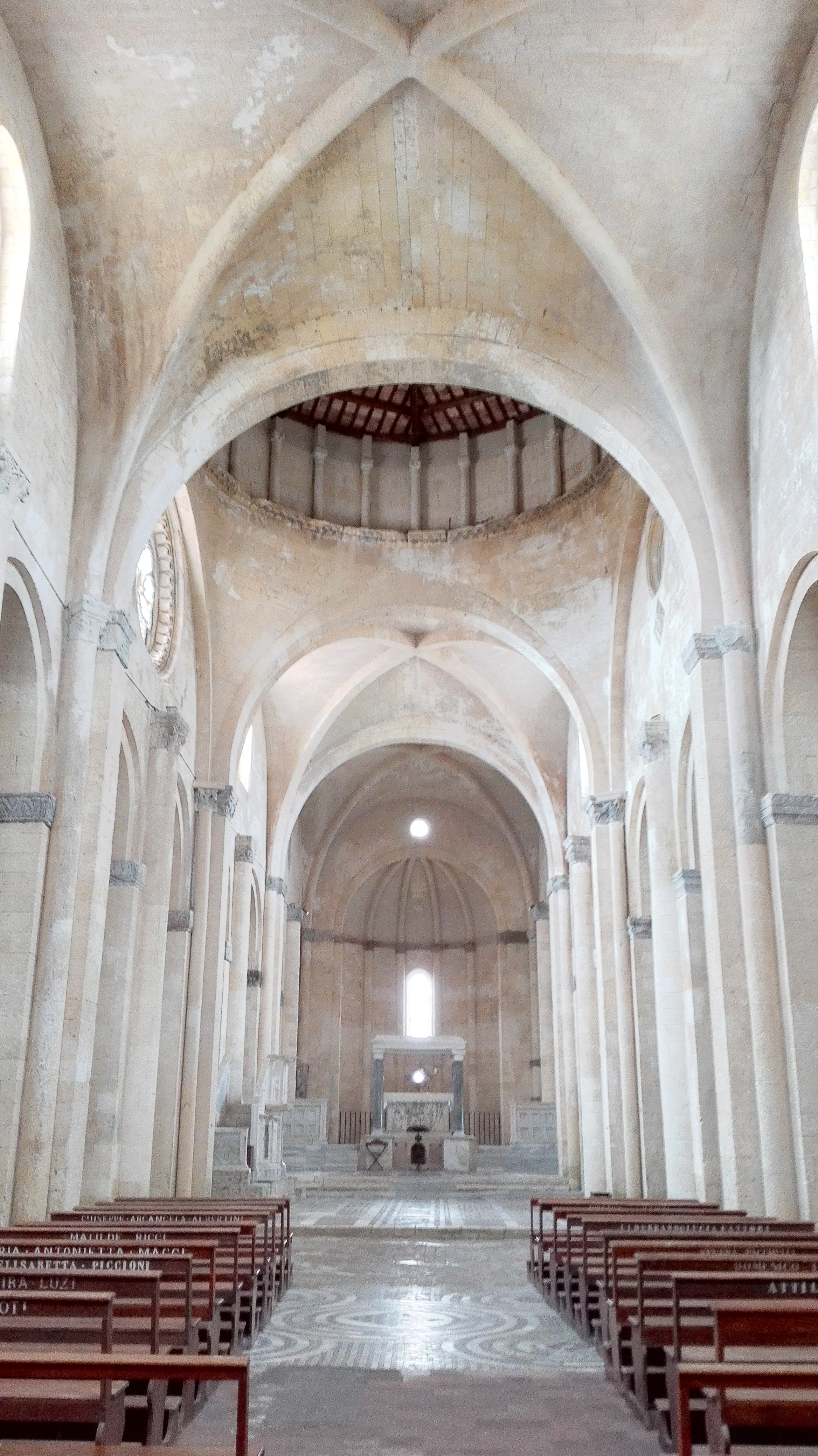 Navata Centrale Santa Maria in Castello (Tarquinia)